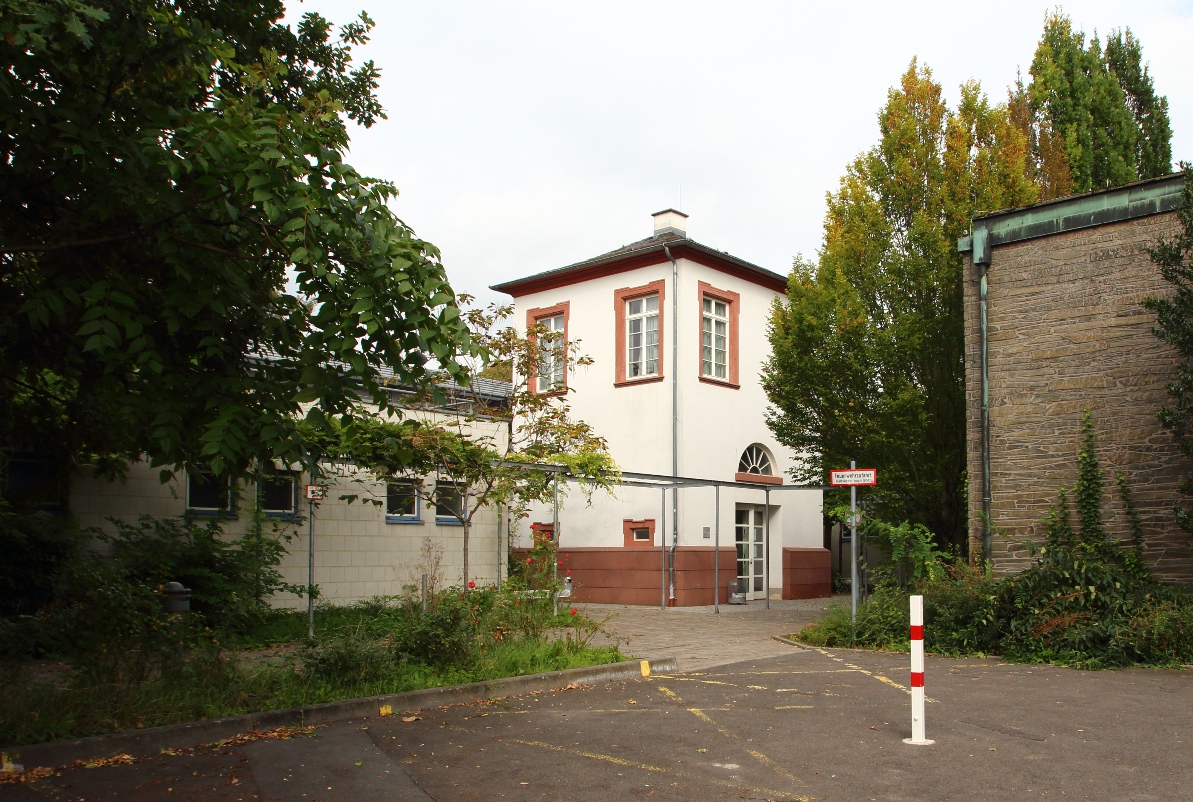 Gartenpavillon des Kronberger Hofes. Im Inneren Stuckarbeiten aus der Schule des Stuckateurs Carlo Maria Pozzi. Rüdesheimer Straße 30, Geisenheim im Rheingau.